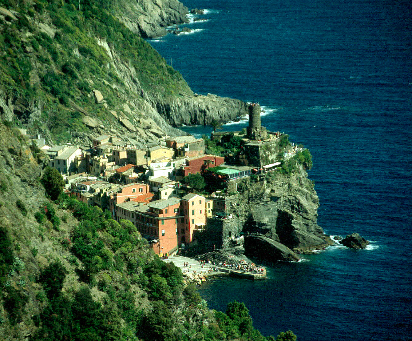 Vernazza 2004